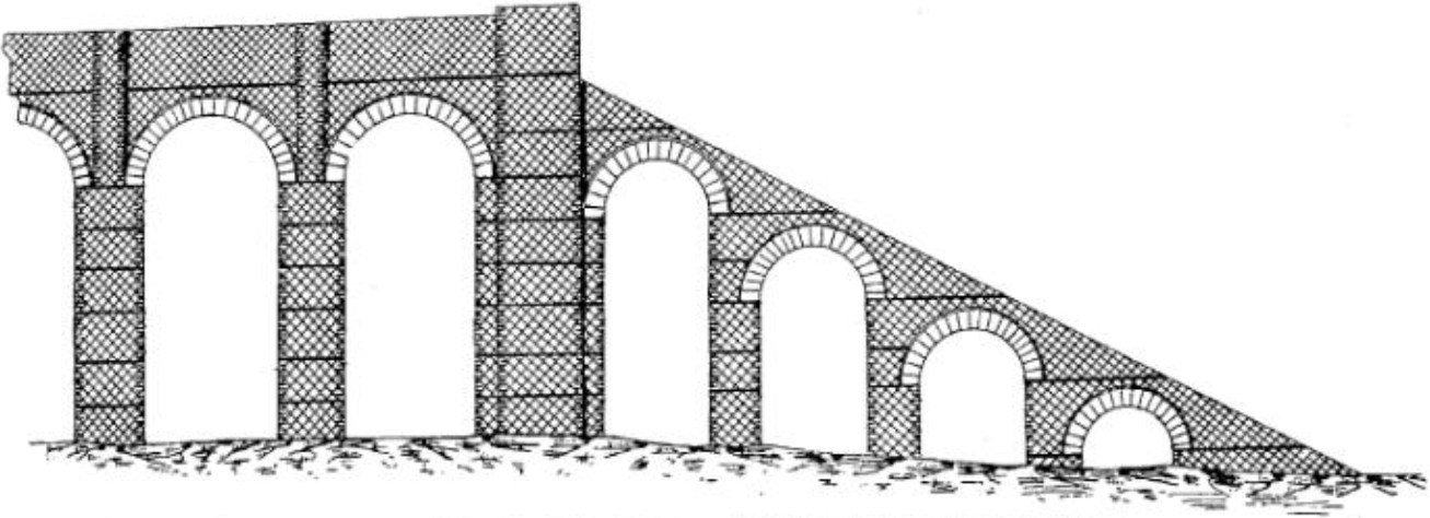 Départ du siphon de Beaunant (aqueduc romain du Gier, apportant jadis l'eau potable à Lugdunum). Détails extérieurs de la construction.